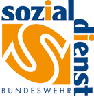 Logo des Sozialdienstes der Bundeswehr